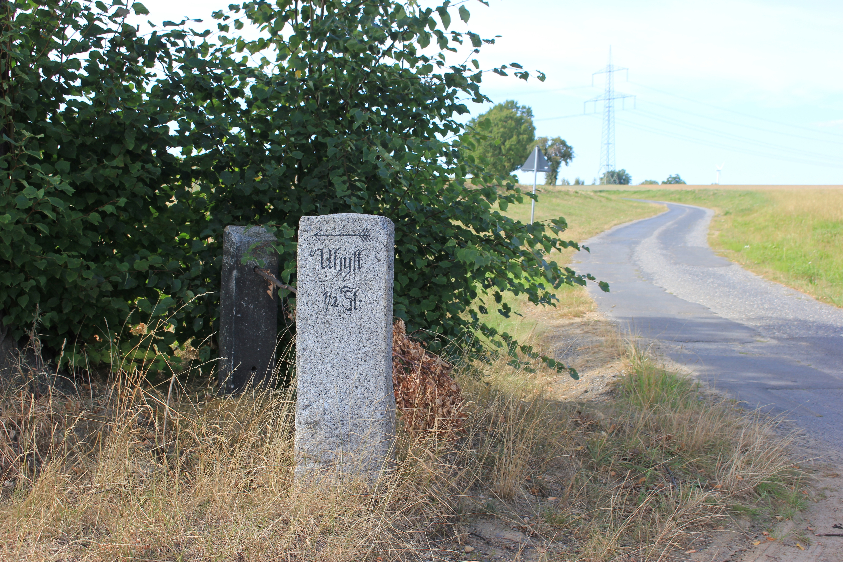 Hornjoserbsce: Kamjentny pućnik w Časecach (kulturny pomnik)